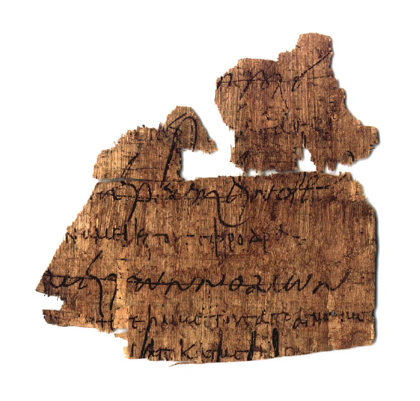 Papyrus Baden IV 59 (recto) 5. Jahrhundert n. Chr.